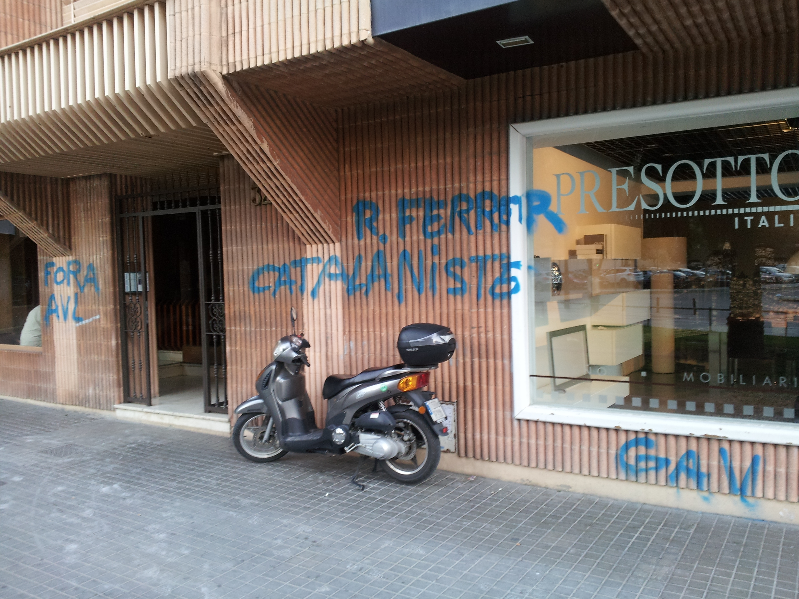 Atac del GAV a la casa de Ramon Ferrer, president de l'Acadèmia Valenciana de la Llengua, patit la matinada del 22 al 23 de maig de 2013.